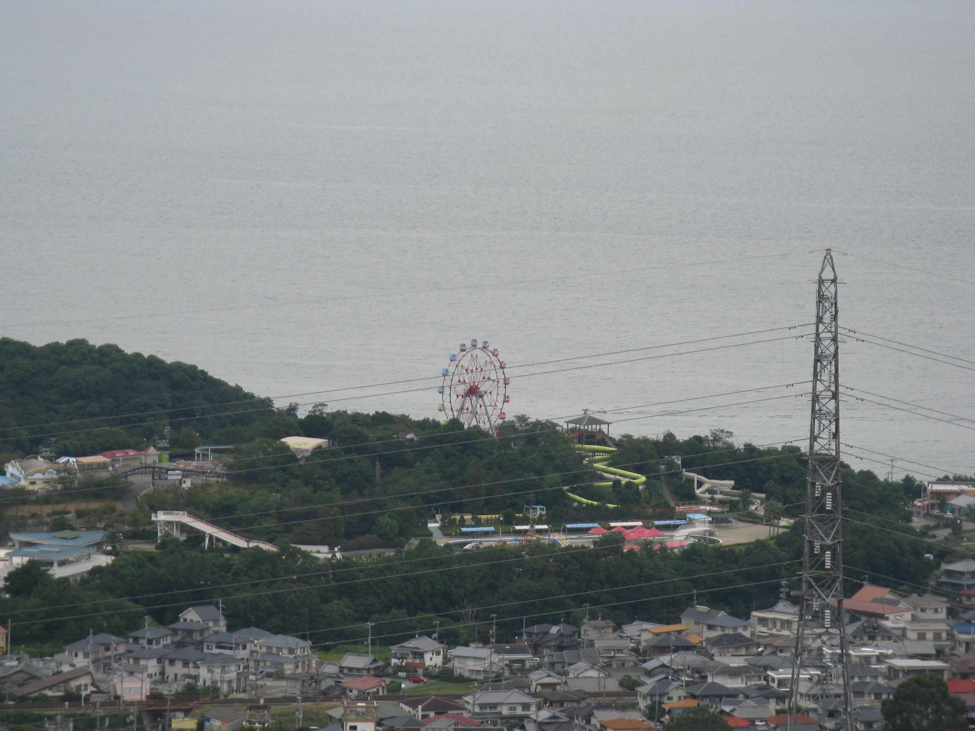 みさき公園